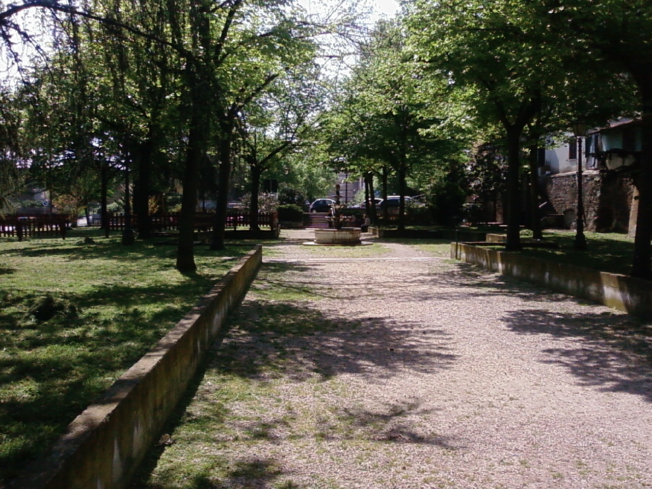 I giardini di Via Porta Aggrippina a Cisterna